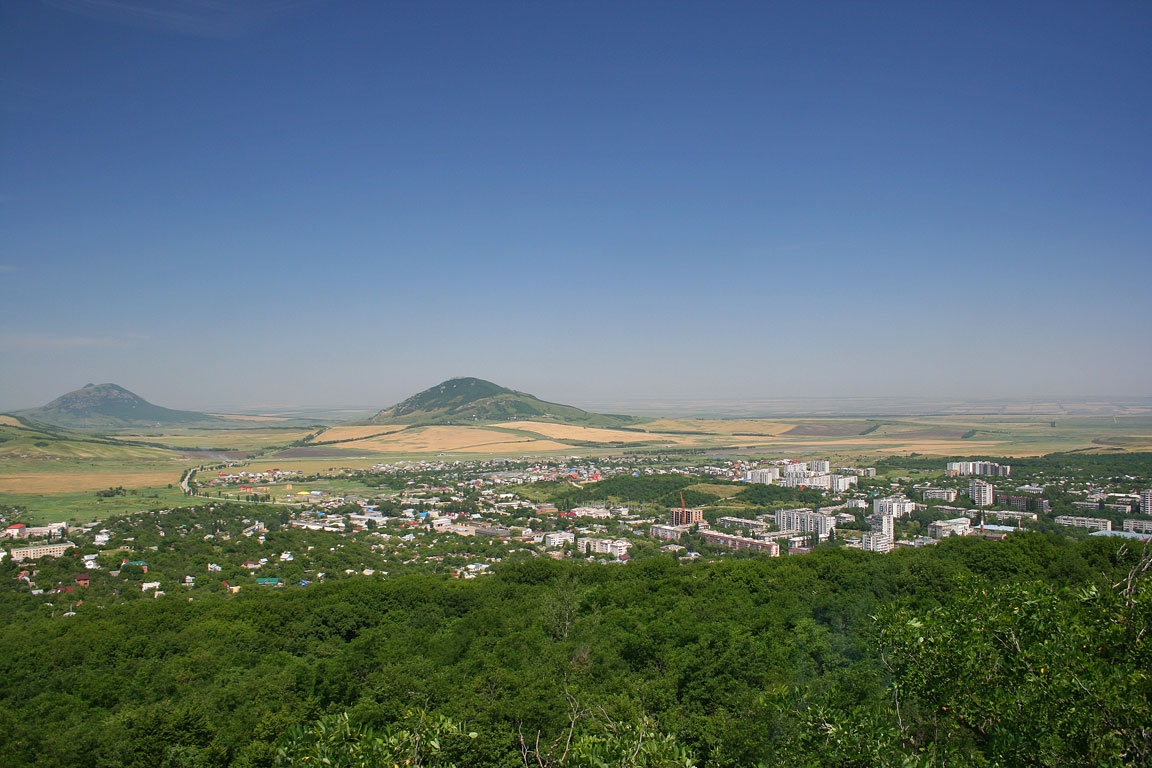 Железноводск. Западная часть города